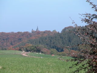 Kloster Steinfeld - Ansicht von Süd-West, Diefenbach-Steinfelderheistert